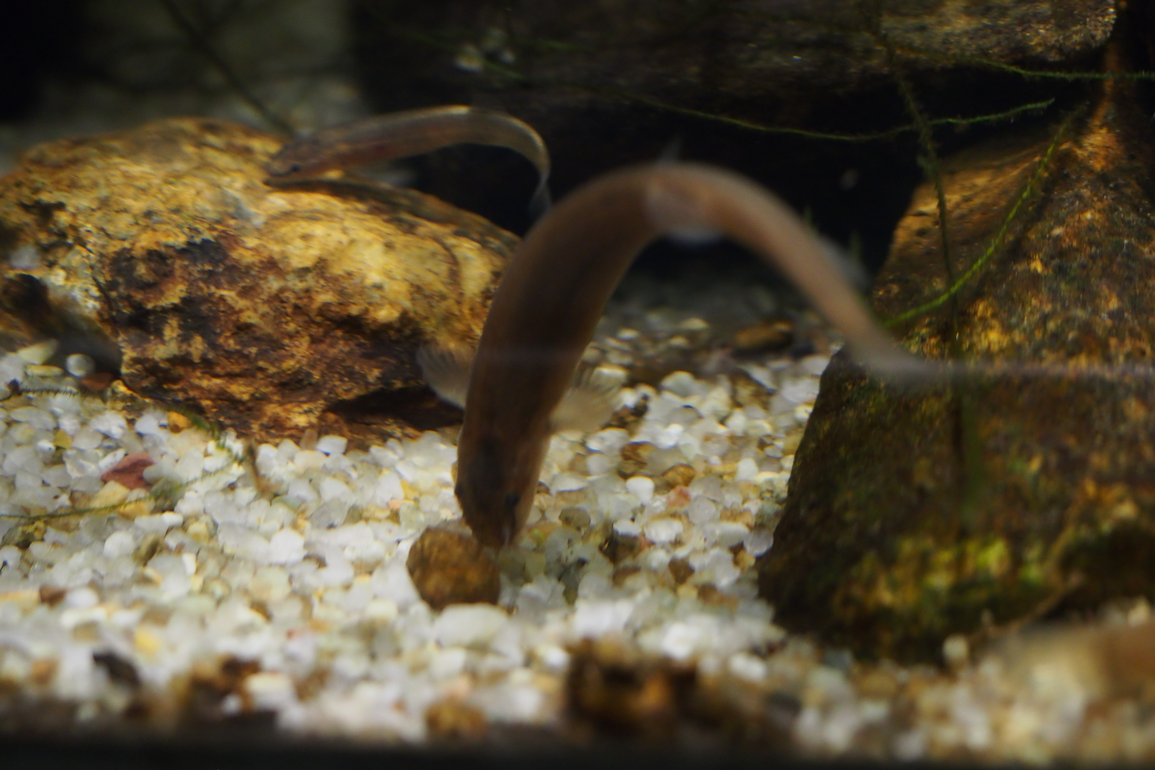 ナガレホトケドジョウ.